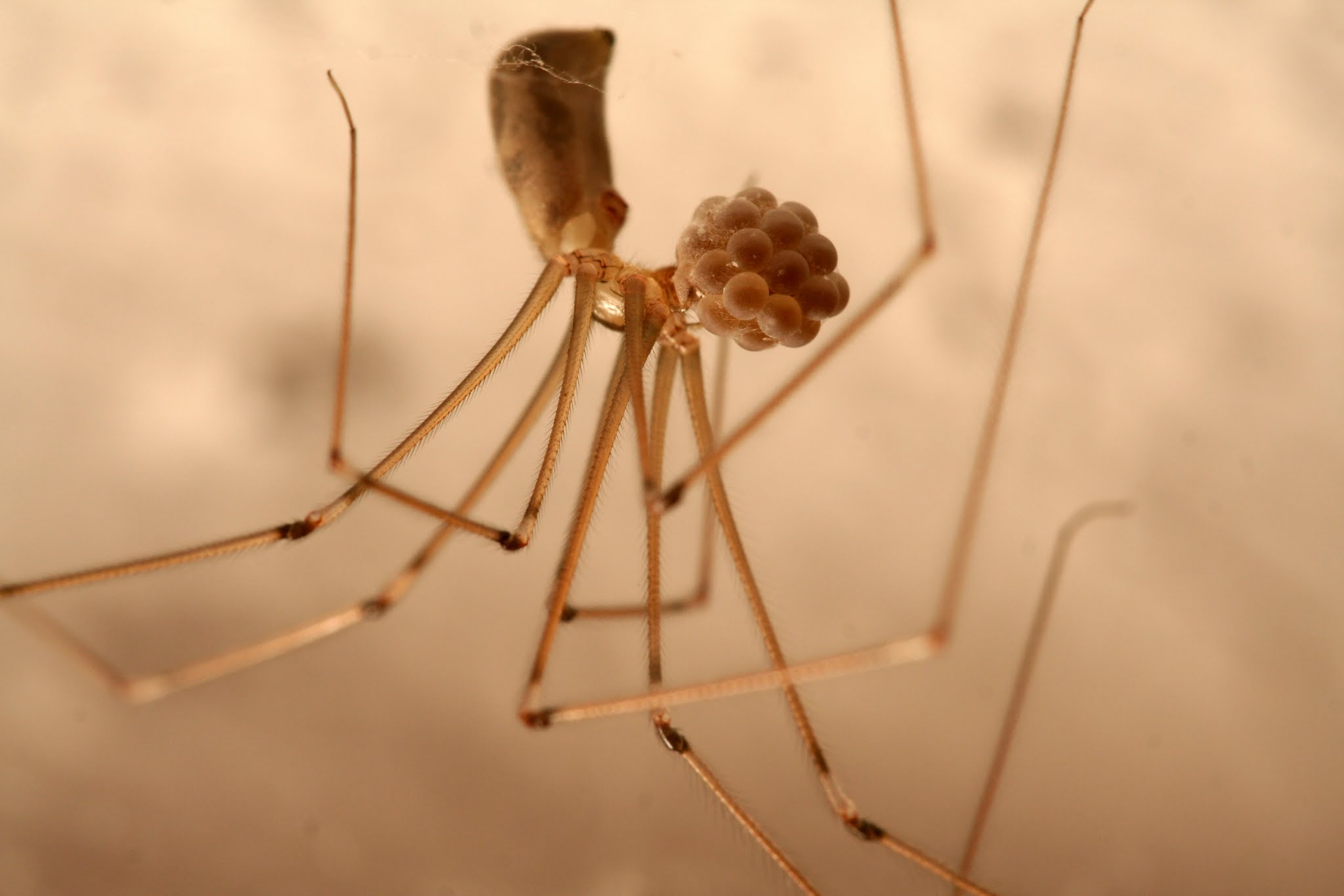 Paolo Geminiani, Femmina di Pholcus phalangioides mentre trasporta le uova